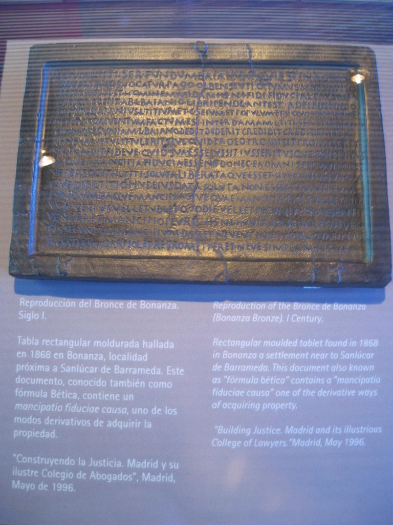 Reproducción del Bronce de Bonanza, expuesto en el Centro de visitantes Fábrica de Hielo, de Sanlúcar de BarramedaCorresponde con la inscripción CIL II 5042 = CIL II 5406 = AE 2000, 66-67, y su texto dice: Dama L(uci) Titi ser(vus) fundum Baianum qui est in agro qui/ Veneriensis vocatur pago Olbensi uti optumus maxumusq(ue)/ esset HS n(ummo) I et hominem Midam HS n(ummo) I fidi fiduciae causa man/cipio accepit ab L(ucio) Baianio libripend antest(ato) ad fines undo/ dixit L(ucius) Baianius L(ucium) Titium et C(aium) Seium et populum et siquos dicere/ oportet/ pactum comventum (sic) factum est inter Damam L(uci) Titi ser(vum) et L(ucium) Baianium/ quam pecuniam L(ucius) [Titius L(ucio)] Baian(i)o dedit dederit credidit crediderit ex/pensumve tulit tulerit sive quid pro eo promisit promiserit/ spopond(er)it fideve quid sua esse iussit iusserit usque eo is fundus/ eaque mancipia fiducia essent/ donec ea omnis pecunia fides/ve persoluta L(uci) Titi soluta liberataque esset si pecunia sua qua/que die L(ucio) Titio h(eredi)ve eius data soluta non esset tum uti eum/ fundum eaque mancipia/ sive quae mancipia ex is vellet L(ucius) Titi/us h(eres)ve eius vellet ubi et quodie vellet pecunia praesenti/ venderet mancipio pluris HS n(ummo) I invitus ne daret neve sa/tis secundum mancipium daret neve ut in ea ver/ba quae in verba satis s(ecundum) m(ancipium) dari solet repromitteret neve simplam neve [duplam]